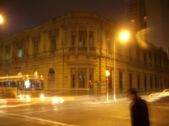 Vista nocturna del Palacio Matte, Santiago, sede de la Escuela de Gobierno y Gestión Pública de la Universidad de Chile